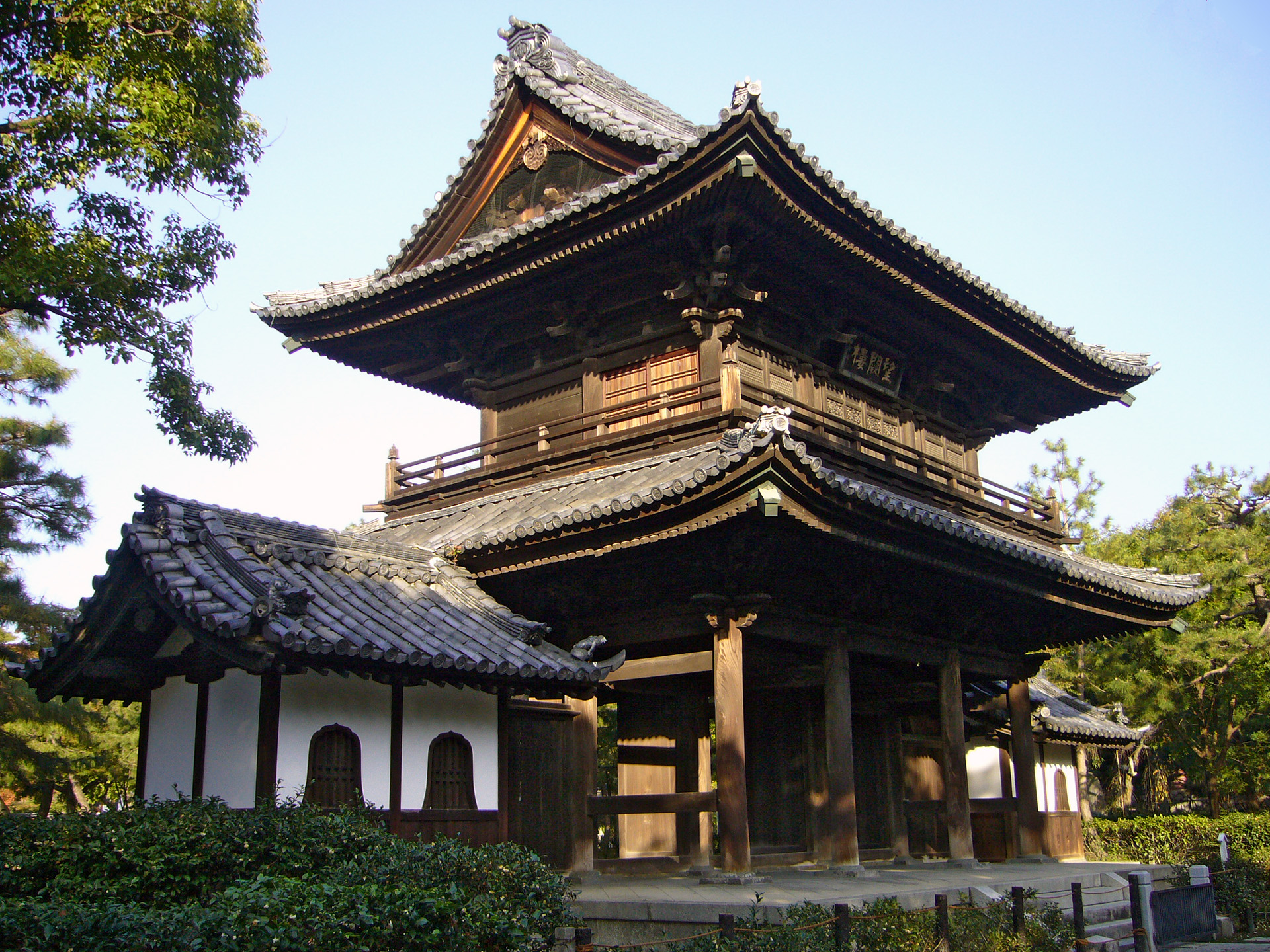 Kenninji in Kyoto, Japan